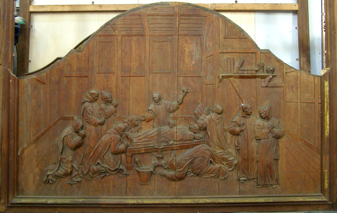 La mort de saint Bruno, fondateur des Chartreux, à Sainte-Marie-de-la-Tour (Calabre). Bois sculpté attribué à Gérard van der Planck (vers 1692 - vers 1750) provenant du choeur de la Chartreuse de Liège. Avec d'autres bas-reliefs, il a été transféré à Saint-Barthélemy (Liège). D'après Stiennon, 1979.